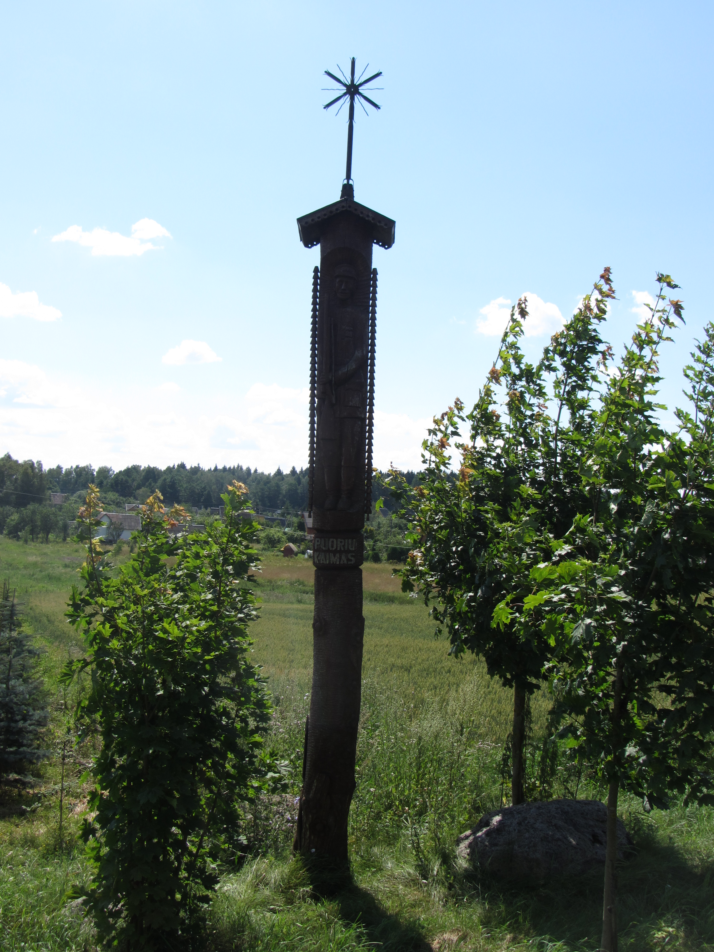 Puoriai 19131, Lithuania